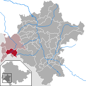 Erbenhausen in Thuringia - District Schmalkalden-Meiningen